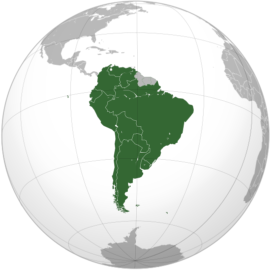 CONMEBOL orthographic projection Mapa CONMEBOL